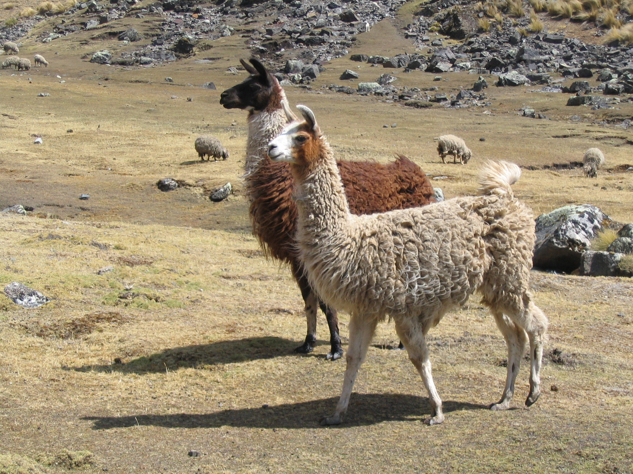 Photo d'un lama pris dans les Andes juste à côté du mont uritorco. Prise en 2005 par User:Anakin.